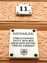 Emléktábla a budapesti Vörösmarty Gimnázium falán, VIII. kerület